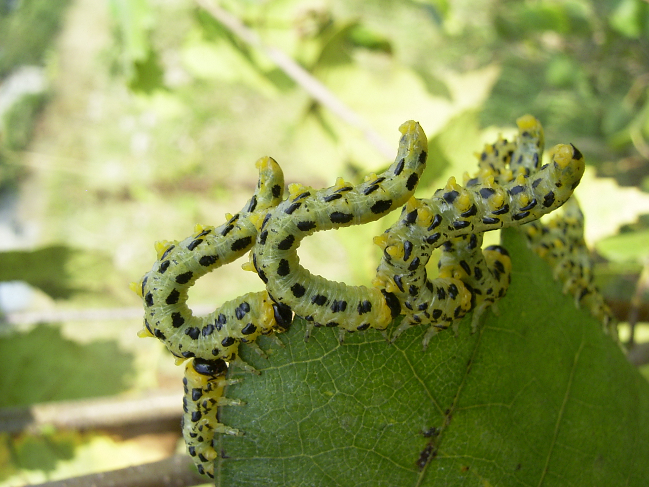 Larwa Płasta brzozowca (Craesus septentrionalis) Poland